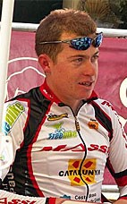 Antoni Miguel Parra